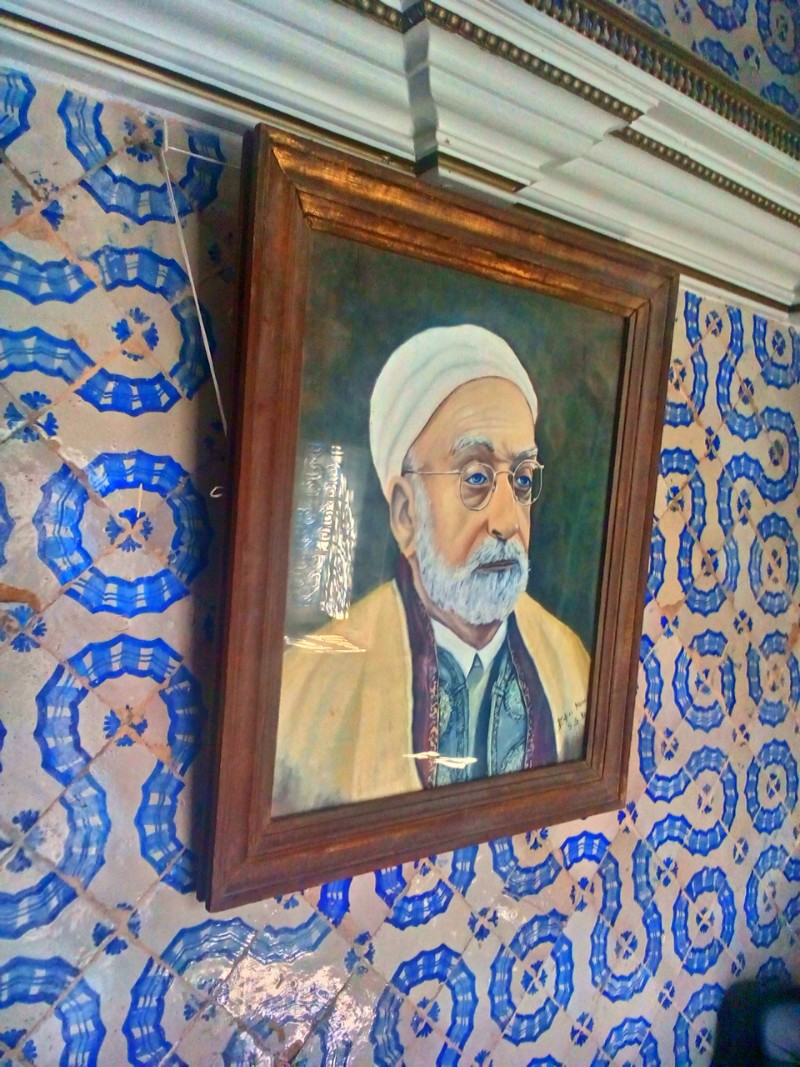 La médina de Tunis, Tunisie مدينة تونس العتيقة ، تونس